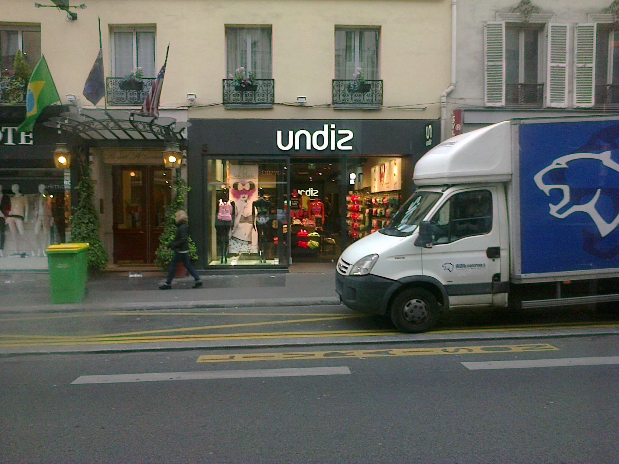 159 rue de Rennes (Paris, France) : Hôtel 'Royal Saint Germain' et boutique 'Undiz'.